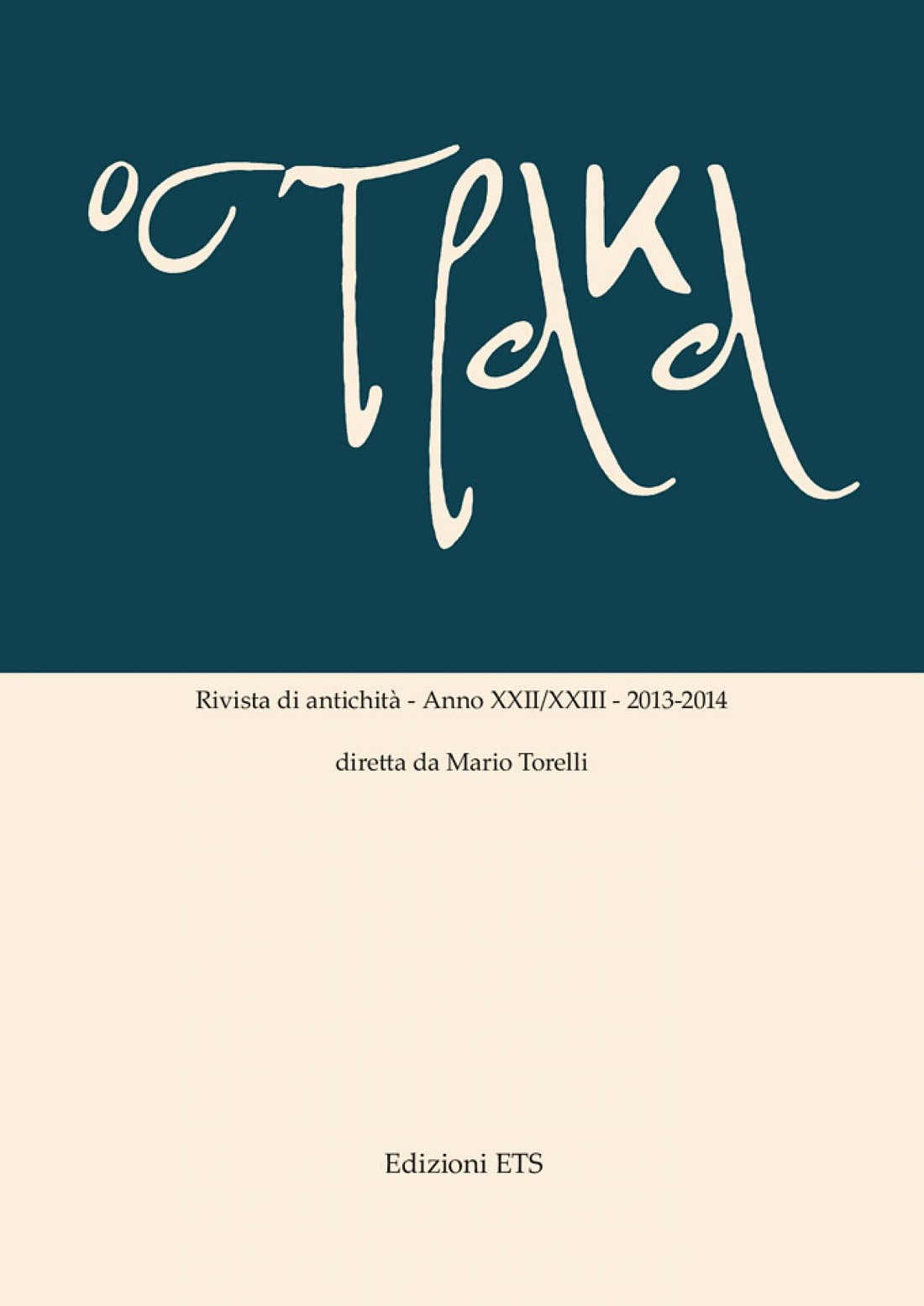 Mario Torelli: Ostraka. Rivista di antichità. Vol. 22-23 (2013-2014), Edizioni ETS 2016, ISBN 9788846744821.